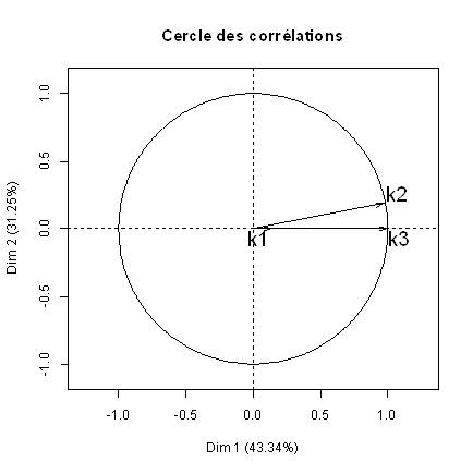 Figure3. AFDM